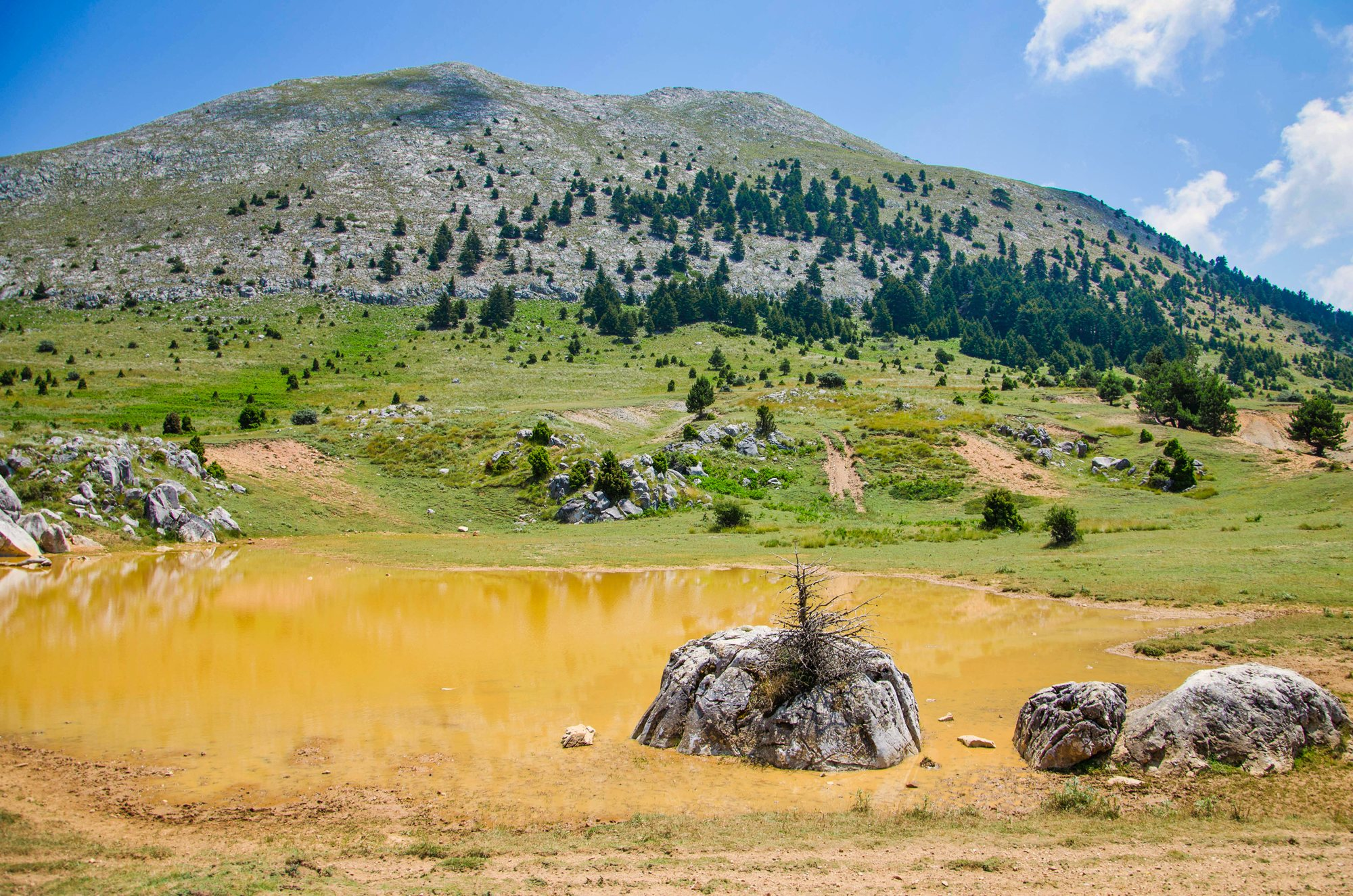 Μεγάλη Τούρλα - Πάρνωνας This is a photography of Natura 2000 protected area with ID GR2520006